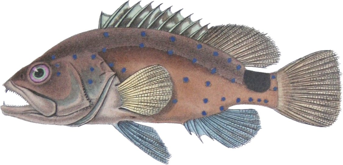 Serranus niveatus Cuv. Val. = Hyporthodus niveatus (Valenciennes, 1828)